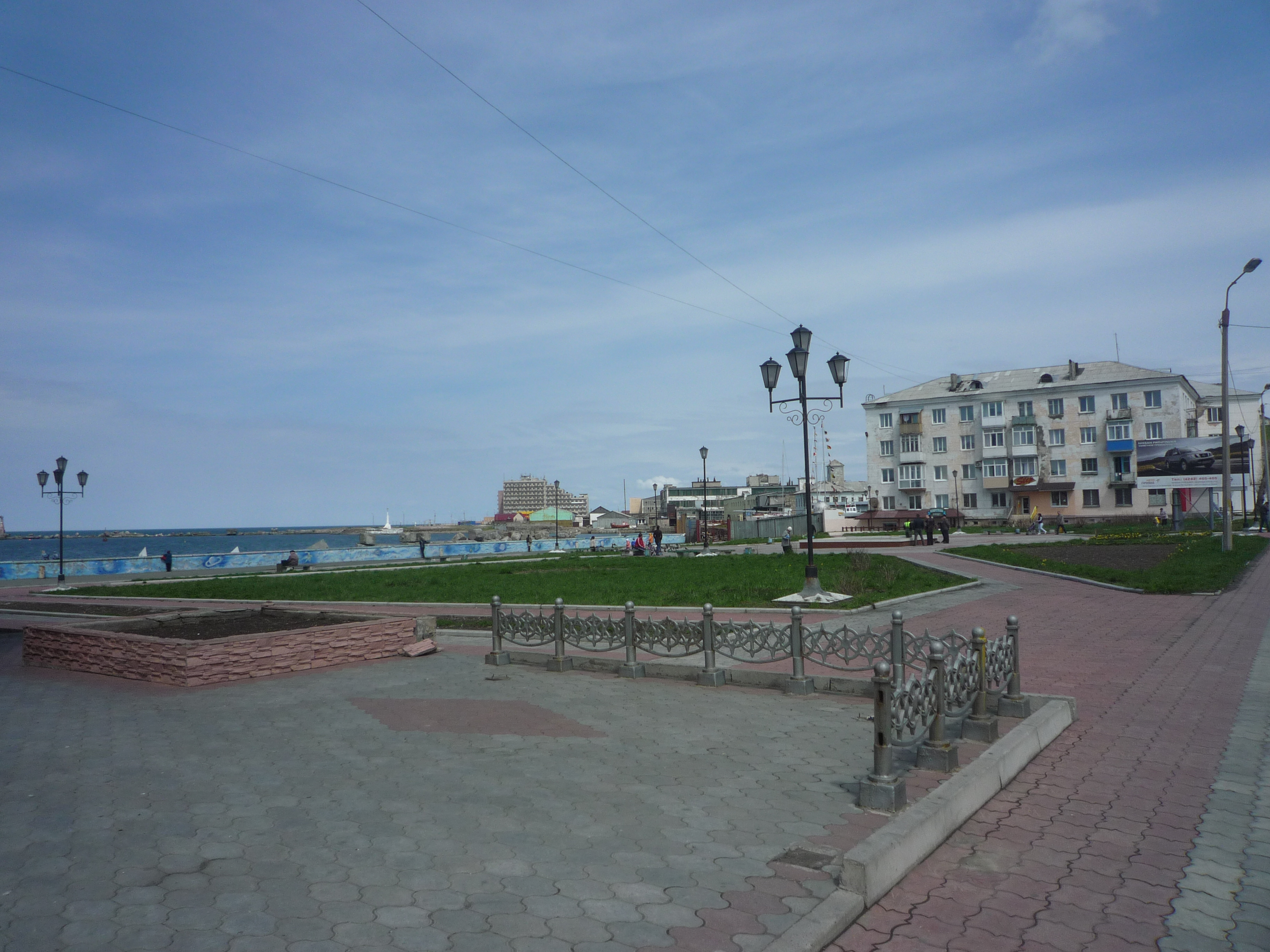 Площадь Мира (Холмск)